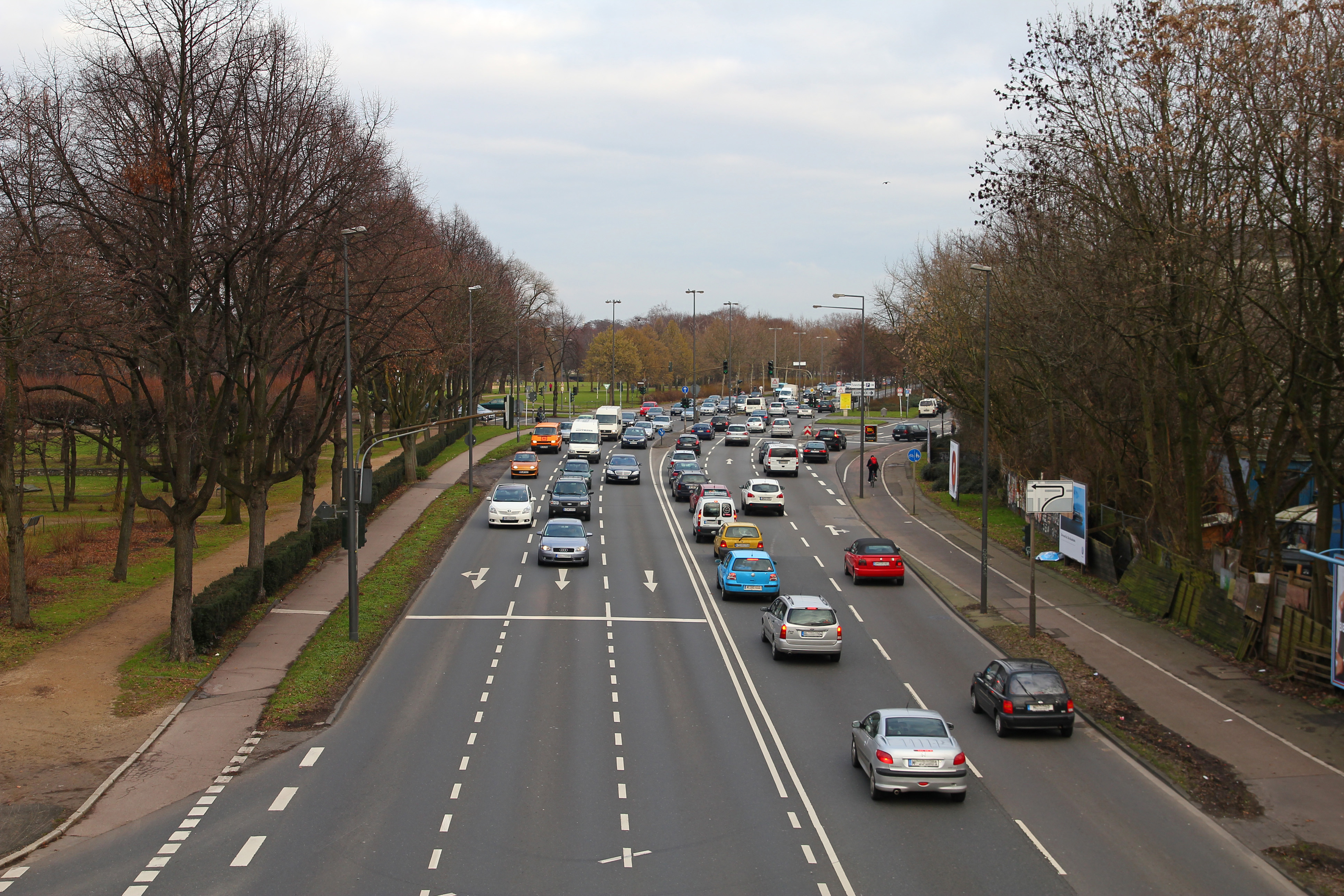 Blick auf die Innere Kanalstraße in Köln von einer Eisenbahnbrücke